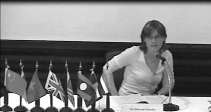 Colloque postdoctoral sur les Sciences de la Santé, Université de Naresuan (juillet 2010)